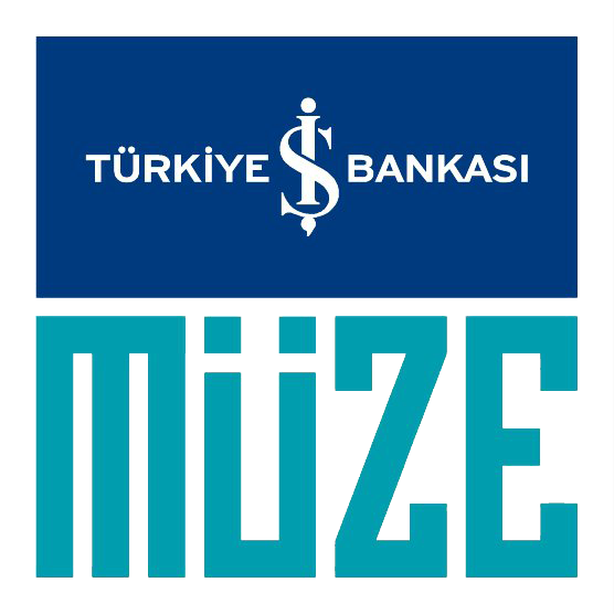 Türkiye İş Bankası Müzesi logosu.